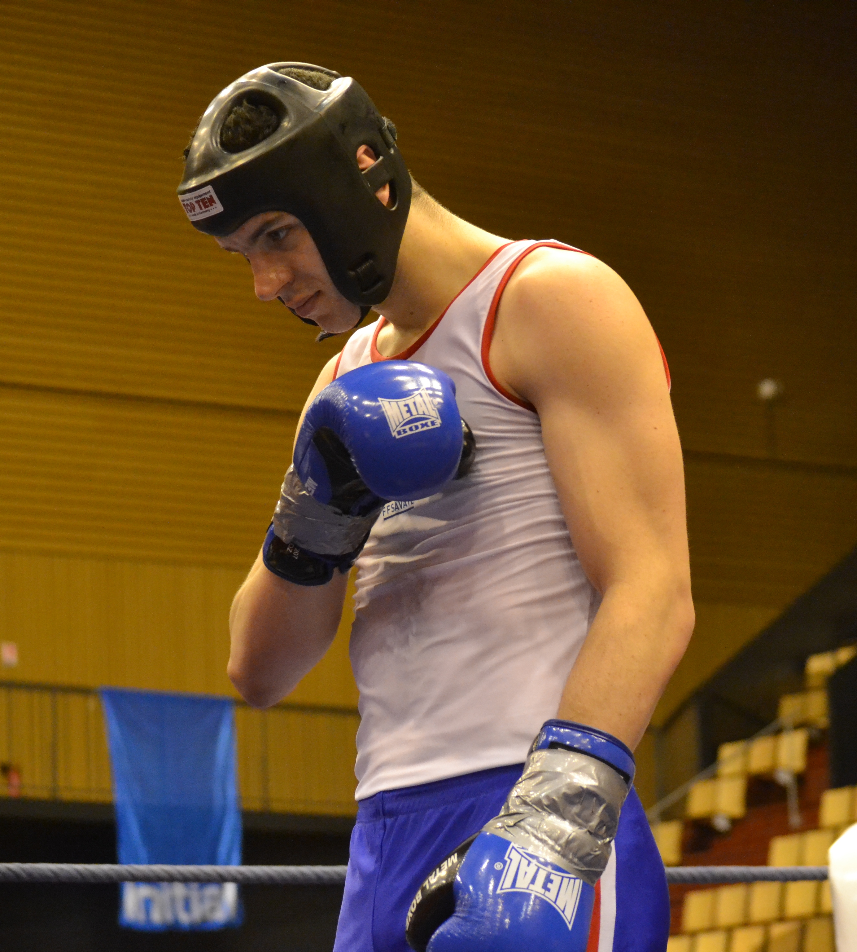 Combat - savate boxe française Championnat Monde 2013